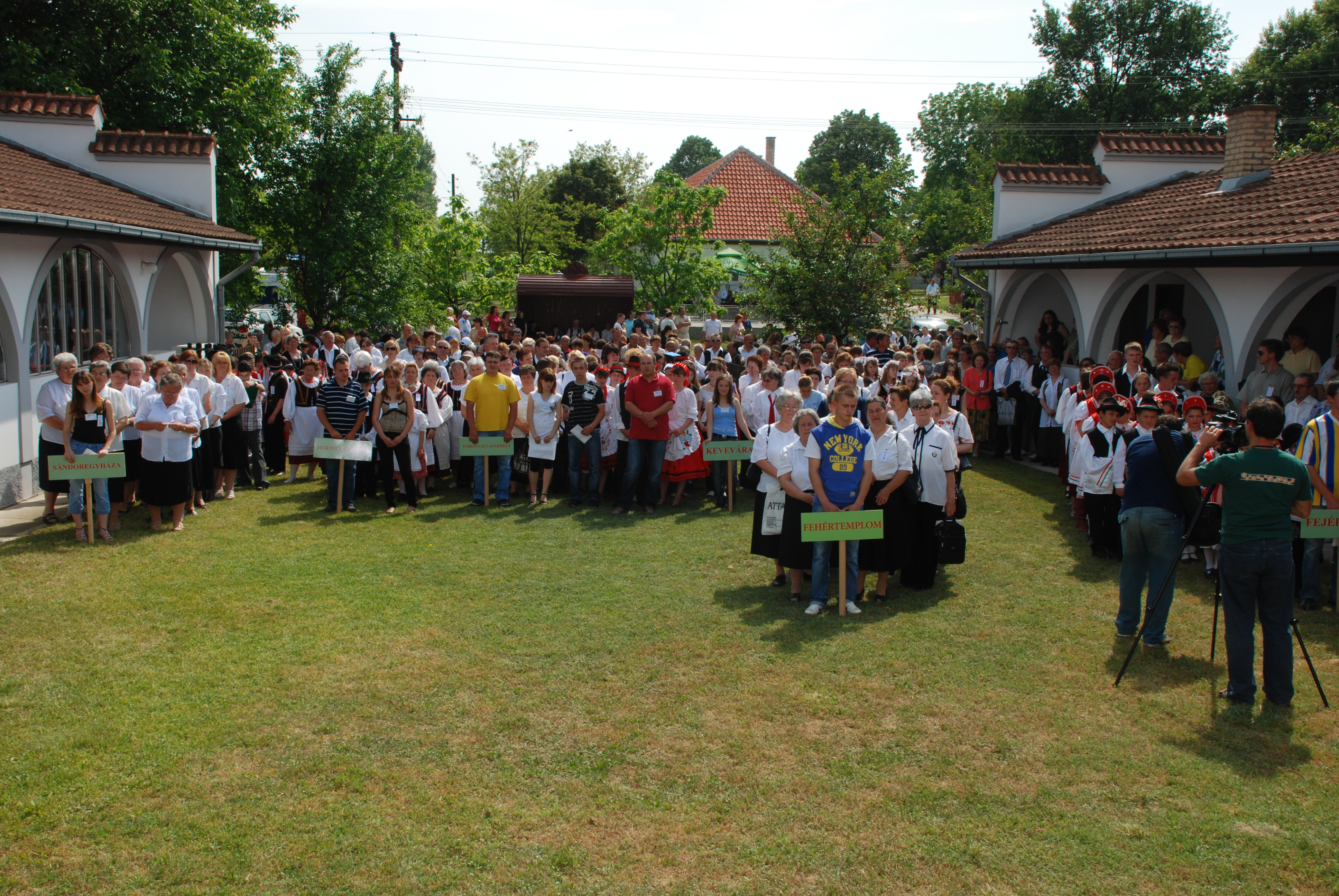 Šušara.KUD 20-ta smotra južno banatckih Mađara 2009 g.